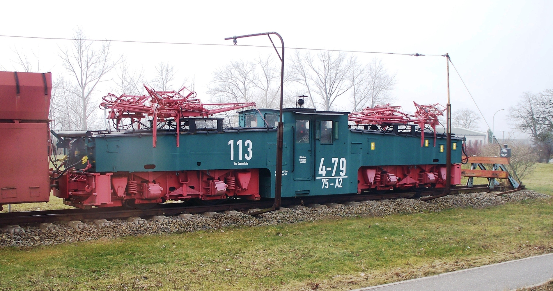 Industrielokomotive der Baureihe EL 3 4-79-75-A2 im Tagebau Schleenhain.